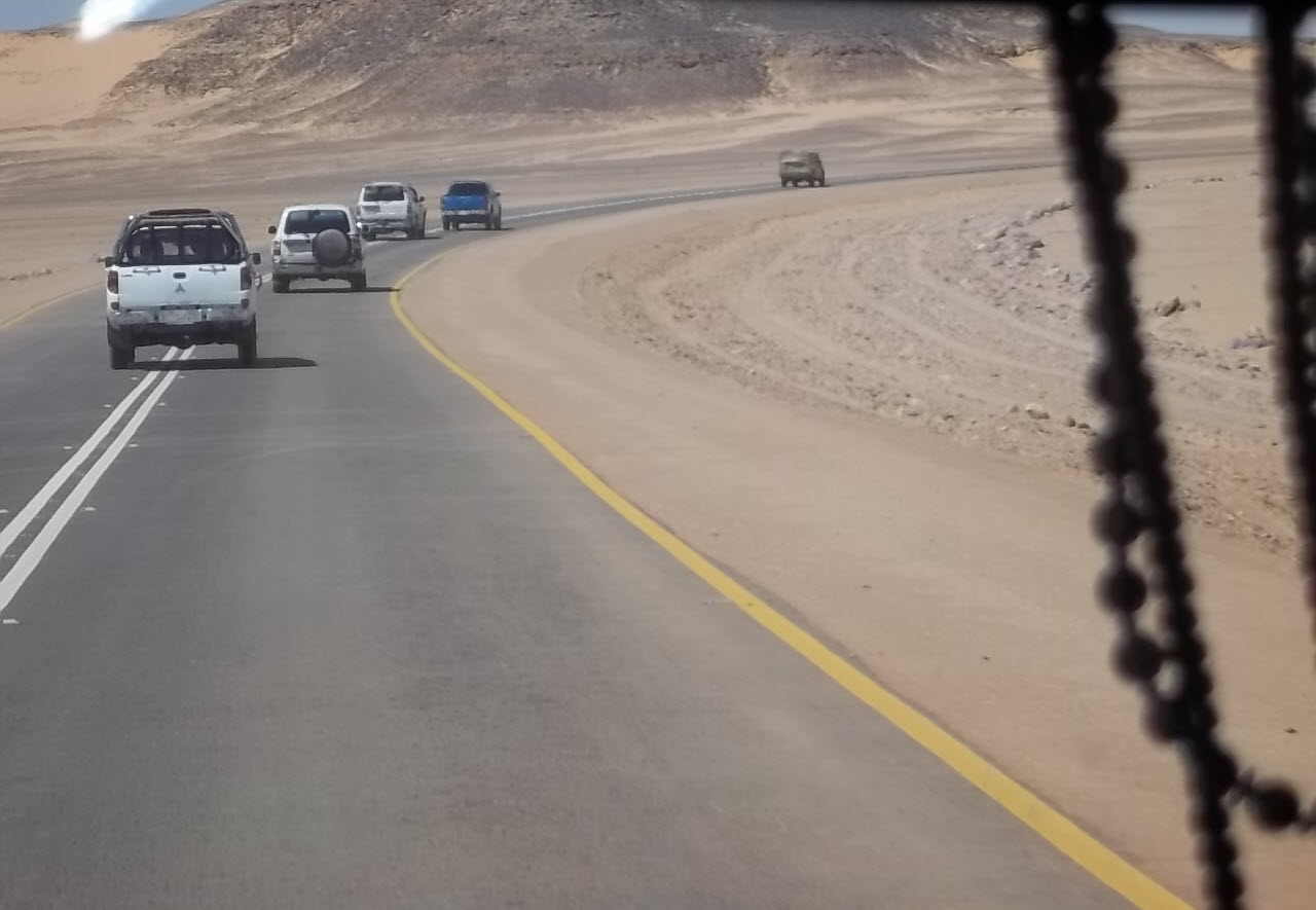 المعبر الدولي بين حلفا-شكيت